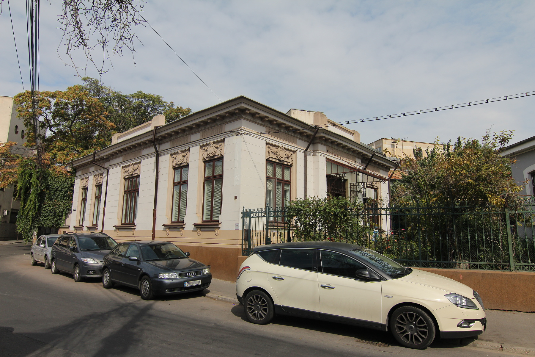 Casă pe Str Robescu